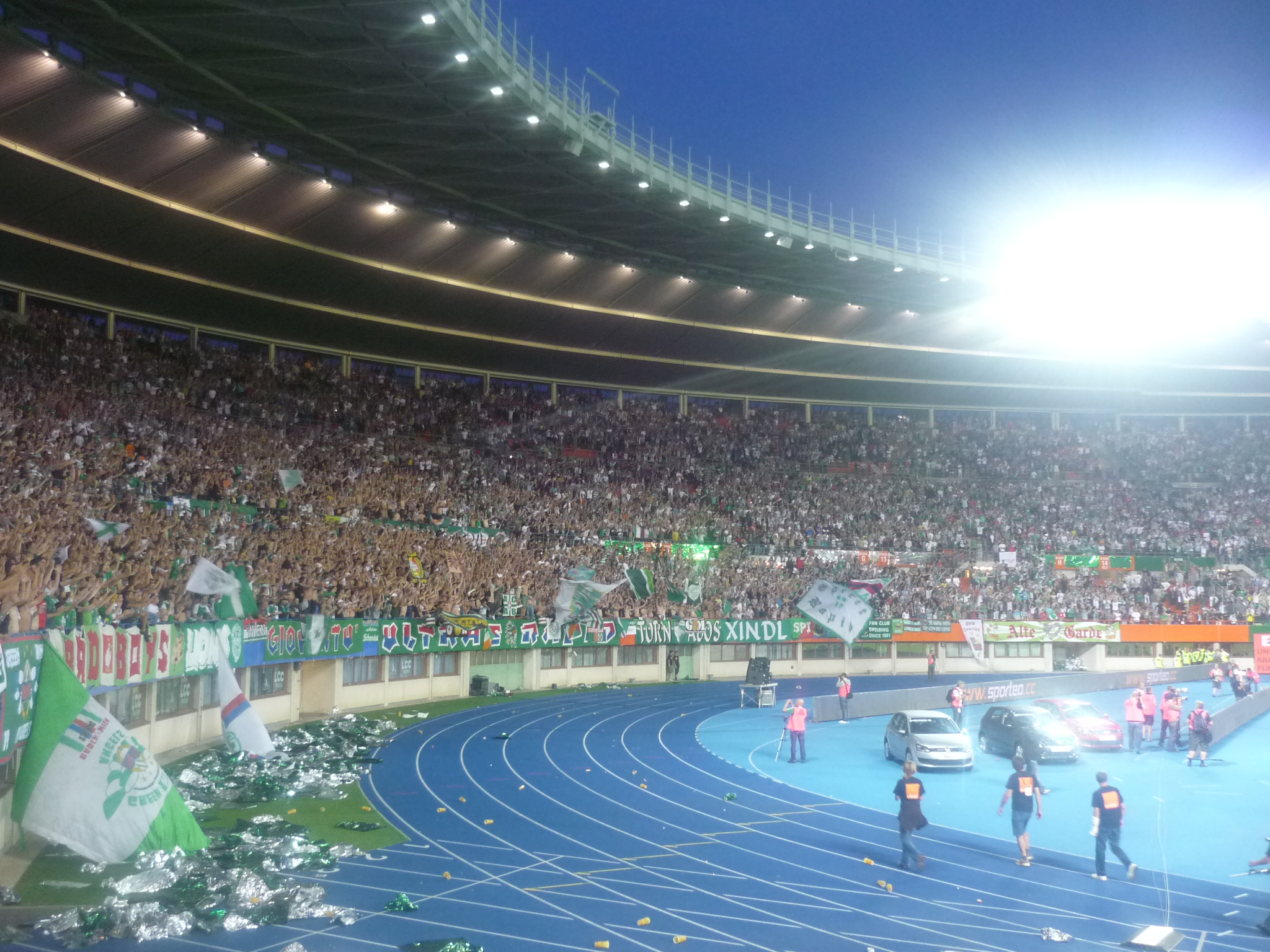 SK Rapid Wien Viertelstunde wird im Wiener Ernst-Happel-Stadion eingeklascht.